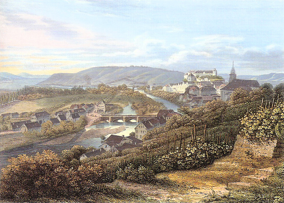 Tübingen und Neckartal vom Österberg (kolorierter Stahlstich 20,6 × 27,6 cm, ca. 1840). Schefold 9346.